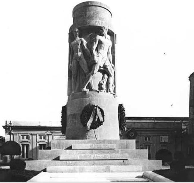 Napoli (Pizzofalcone) - Monumento ad Aurelio Padovani in piazza S. Maria degli Angeli. Il monumento, progettato da Marcello Canino e scolpito da Carlo de Veroli con la collaborazione di Guglielmo Roehrssen, fu inaugurato nel 1934 e distrutto nel 1944-45 durante la generale rimozione dei simboli fascisti. Autore della foto sconosciuto.